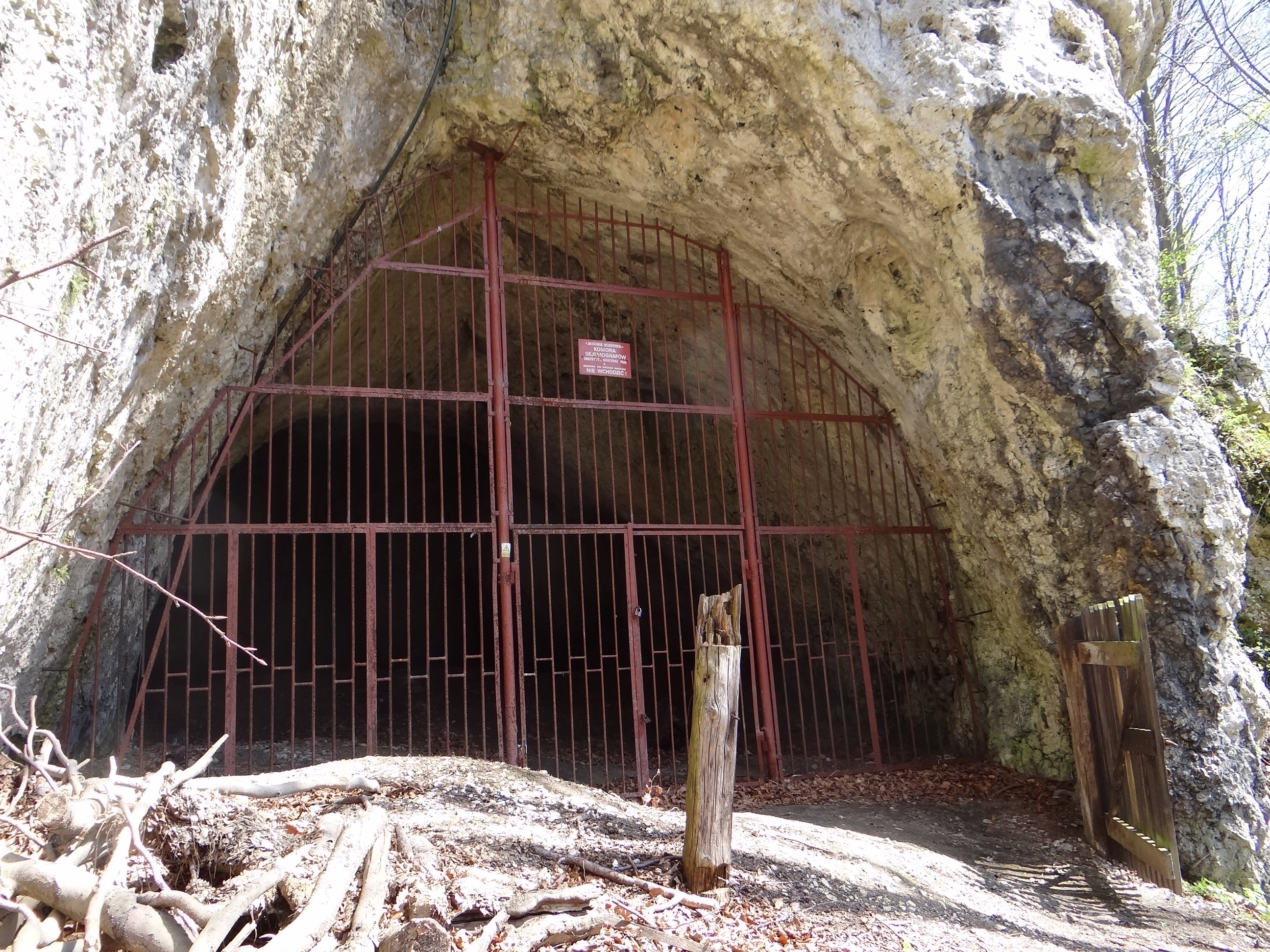 Jaskinia Koziarnia w Ojcowskim Parku Narodowym